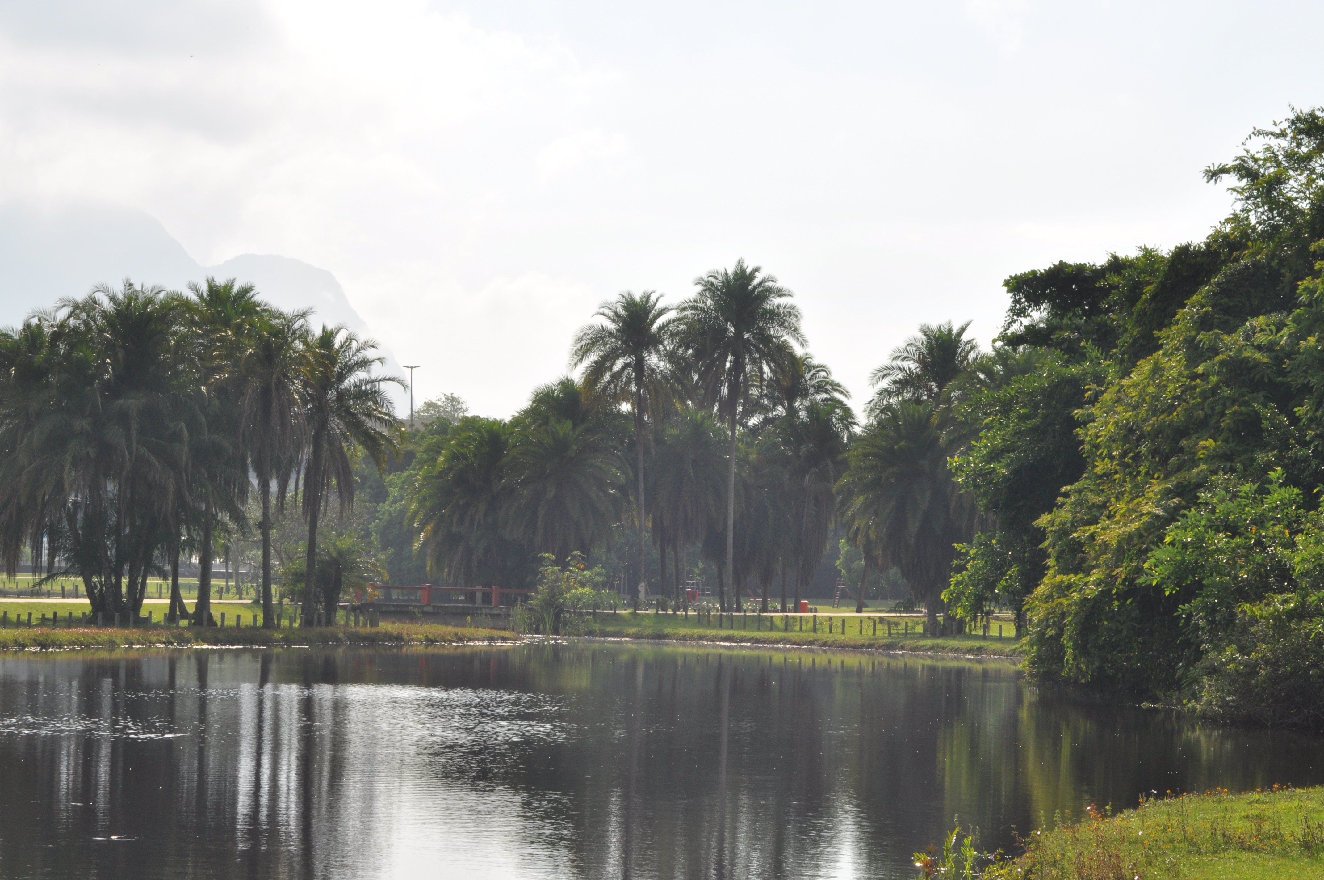 Nikon D90 Lente 50mm